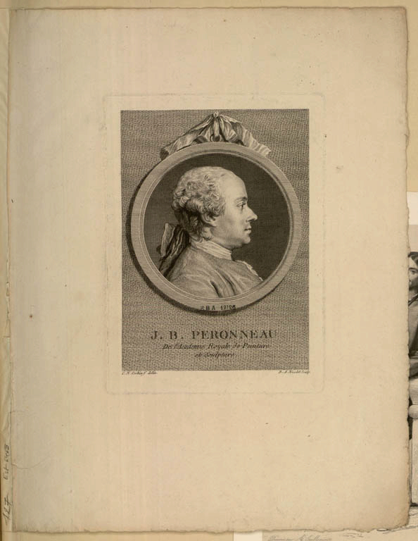 Portrait de Jean-Baptiste Perronneau (1715-1783)